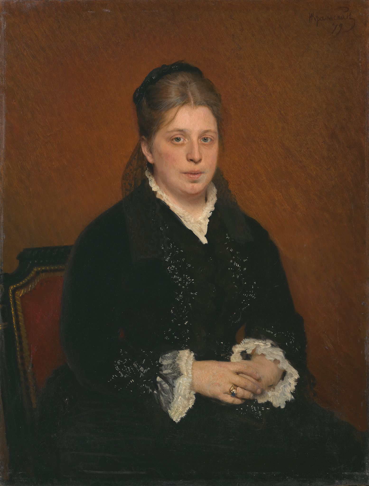 Портрет Софьи Сергеевны Боткиной